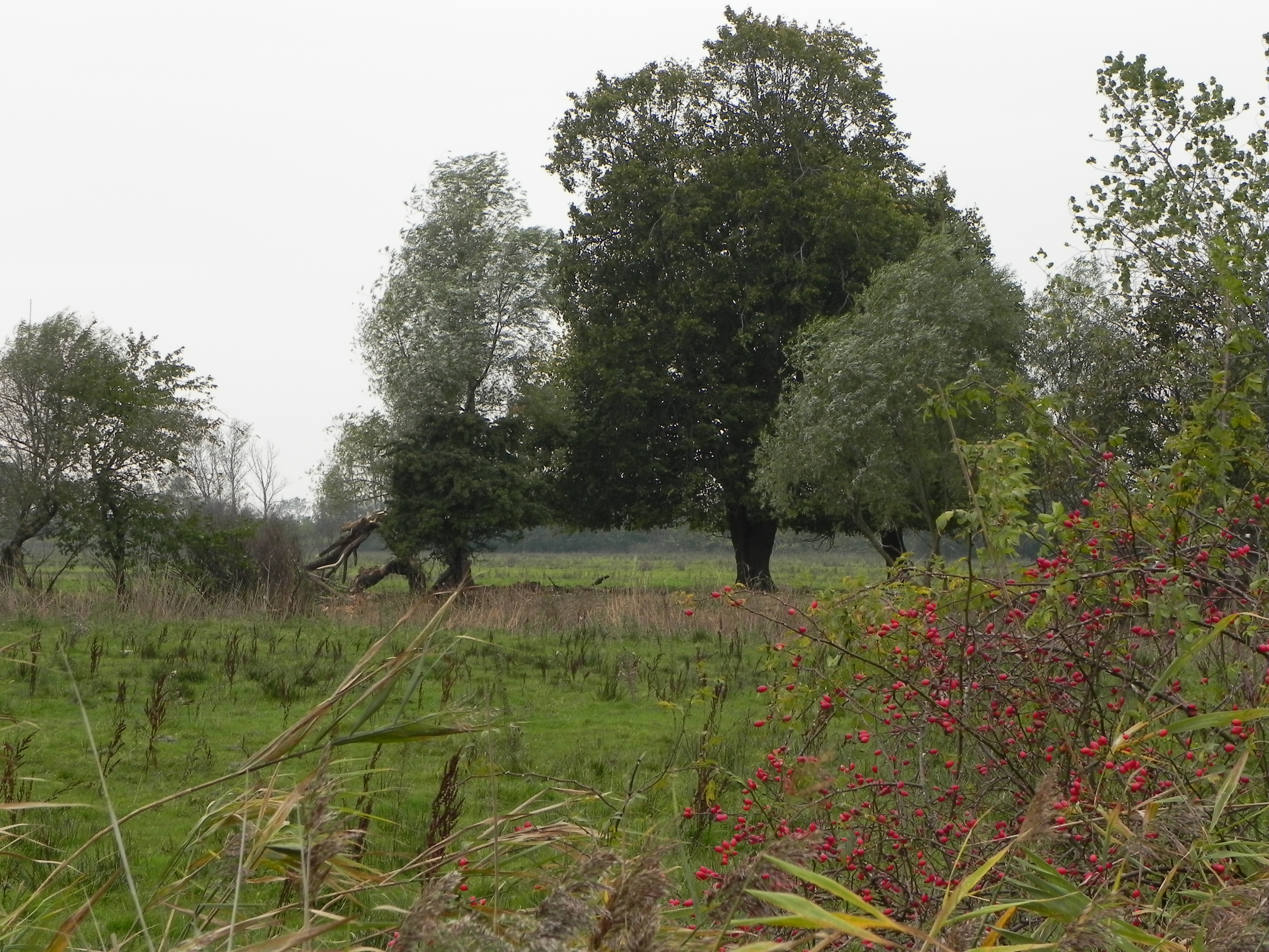 Naturnahe Landschaft auf den Sundischen Wiesen